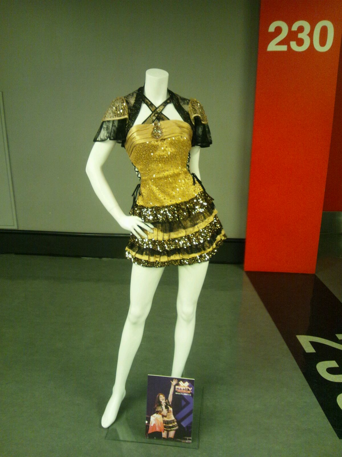 アニメロミックス Presents Minori Chihara Birthday Live 2012 supported by JOYSOUND 衣装展覧会より『Minori Chihara Live 2012 PARTY-Formation』の衣装。